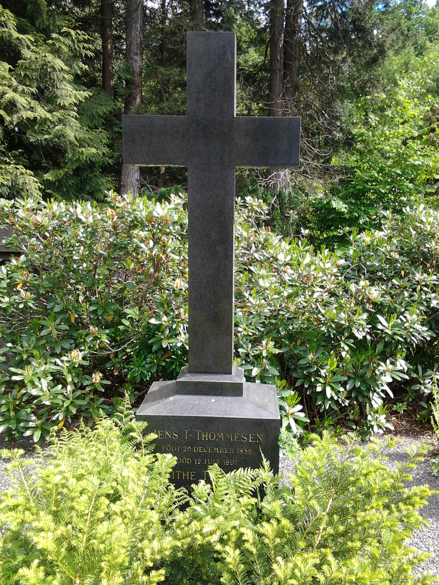 Grav på Arendal kirkegård